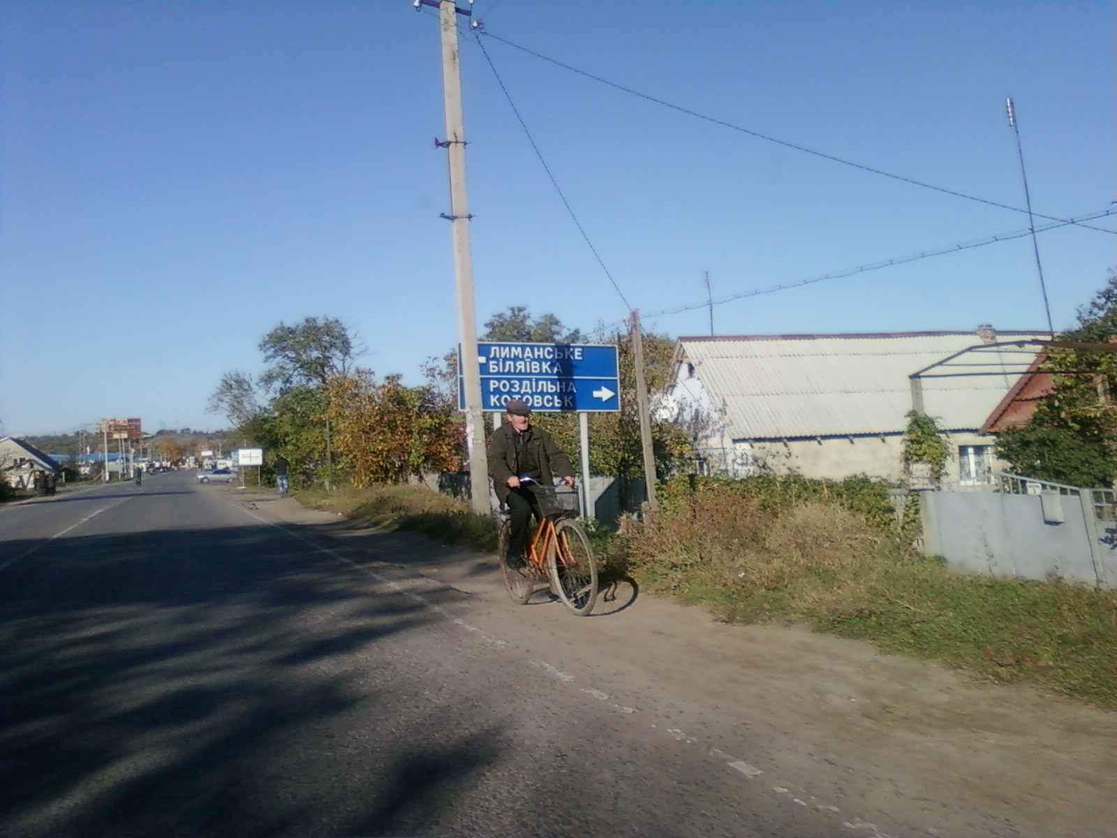 Вулиця Одеська села Кучургани, Роздільнянський район, Одеська область